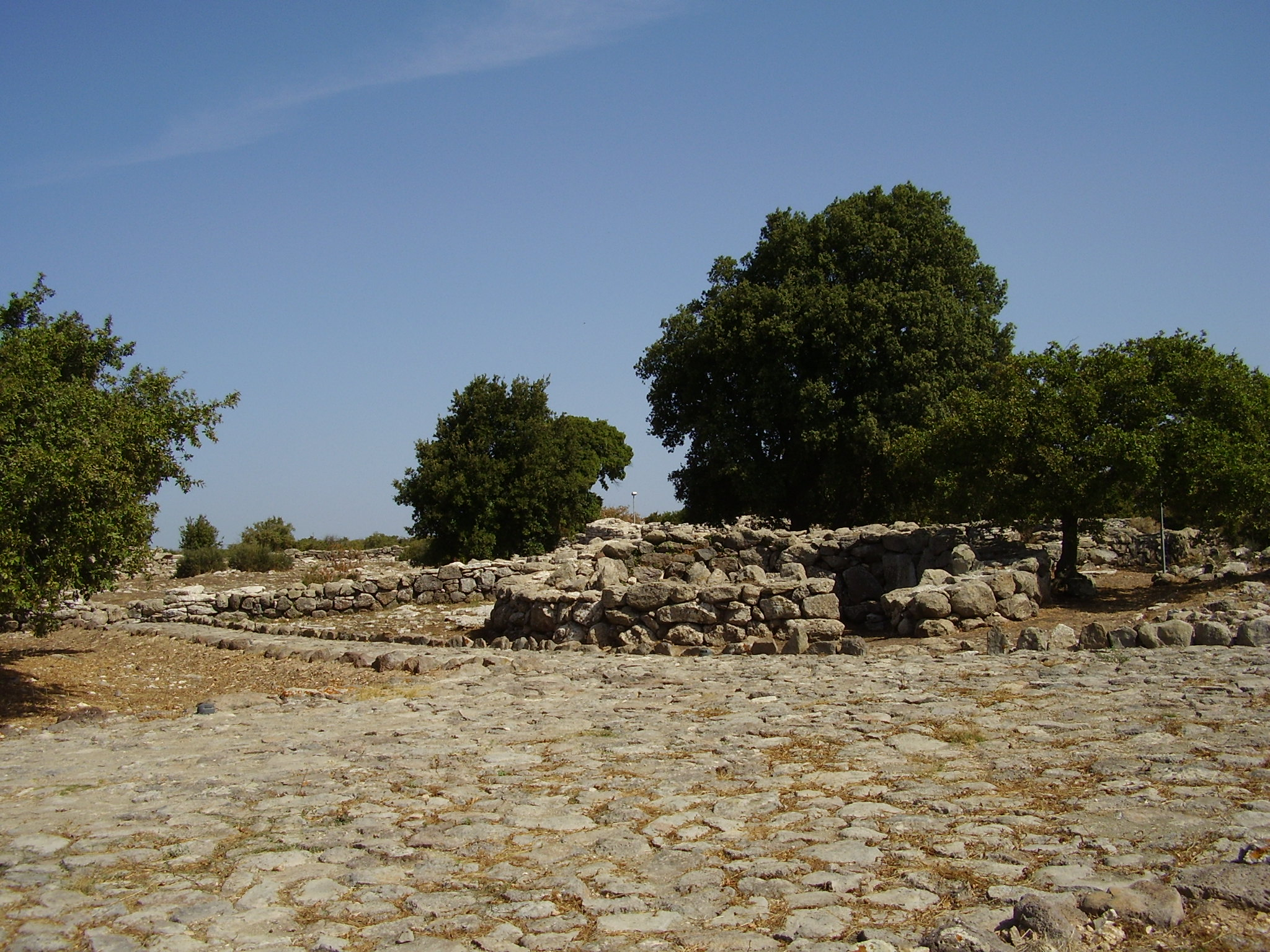 Santuario nuragico di Santa Vittoria - MIBAC This is a photo of a monument which is part of cultural heritage of Italy.